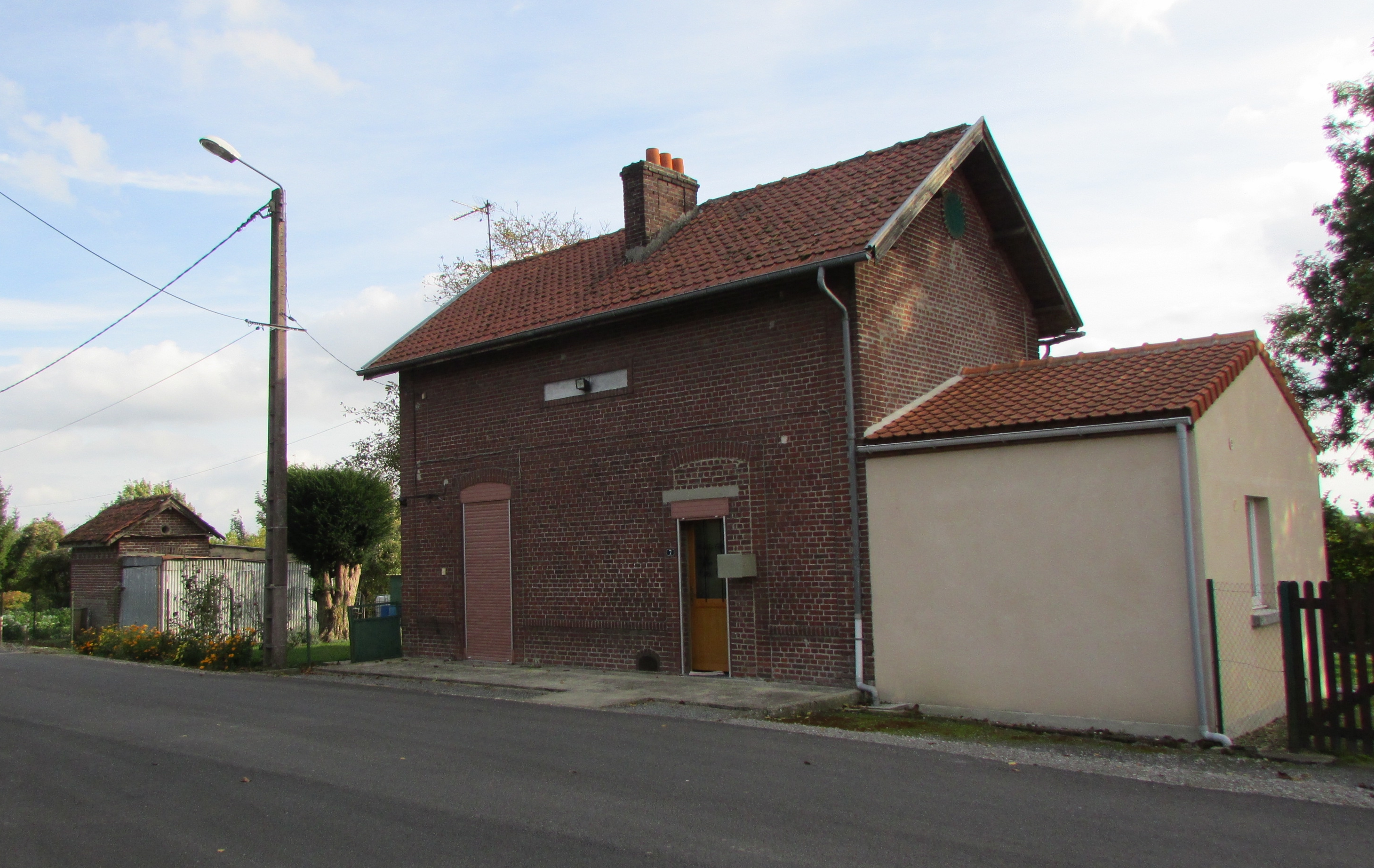 La gare désaffectée de Grougis.